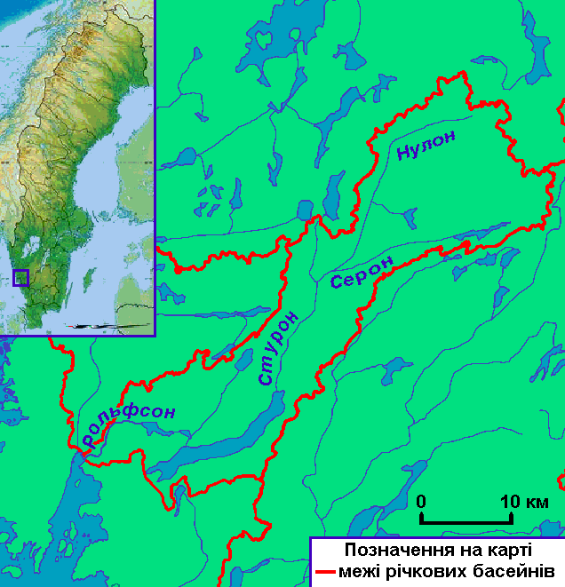 Карта річки Рольфсон на півдні Швеції у ленах Вестра-Йоталанд і Галланд. Створено на основі карти річок лену Вестра-Йоталанд Västra Götalands län на сайті SMHI Шведського інституту метеорології та гідрології. Використано карту File:Sweden relief location map.jpg.